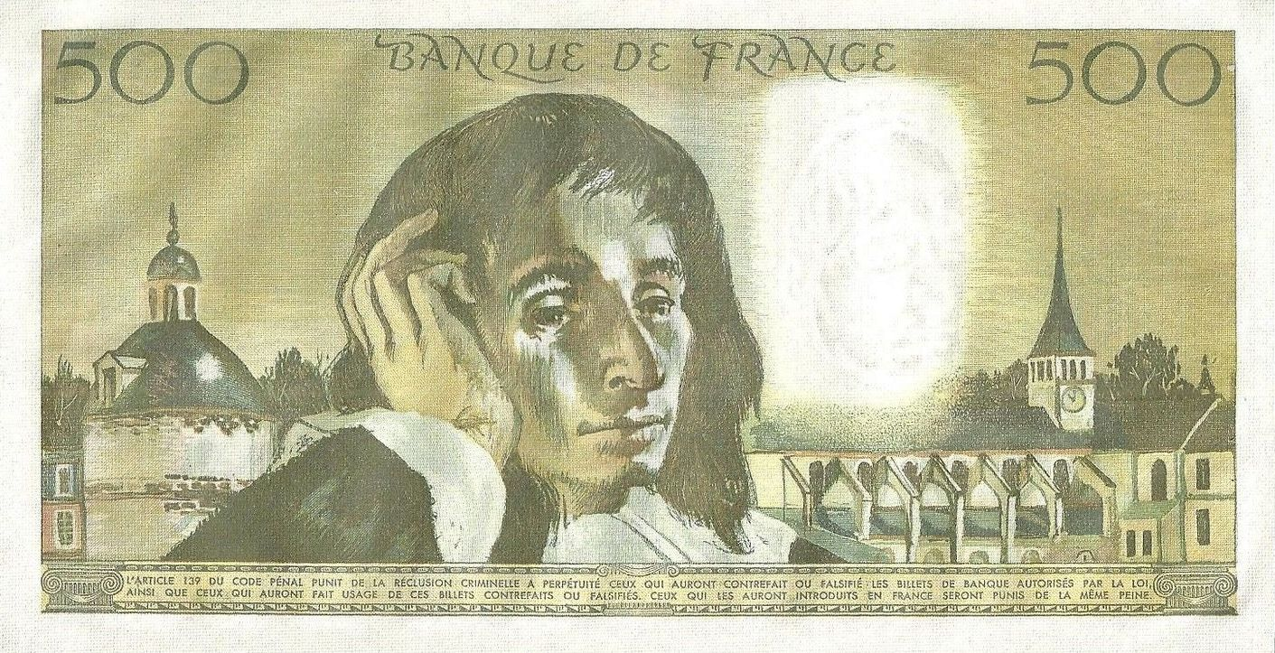 500 francia frank 1969.01.02. Pascal-típus, a neves bankjegytervező, Lucien Fontanarosa (1912-1975) alkotása. Mérete: 183 X 98 mm.